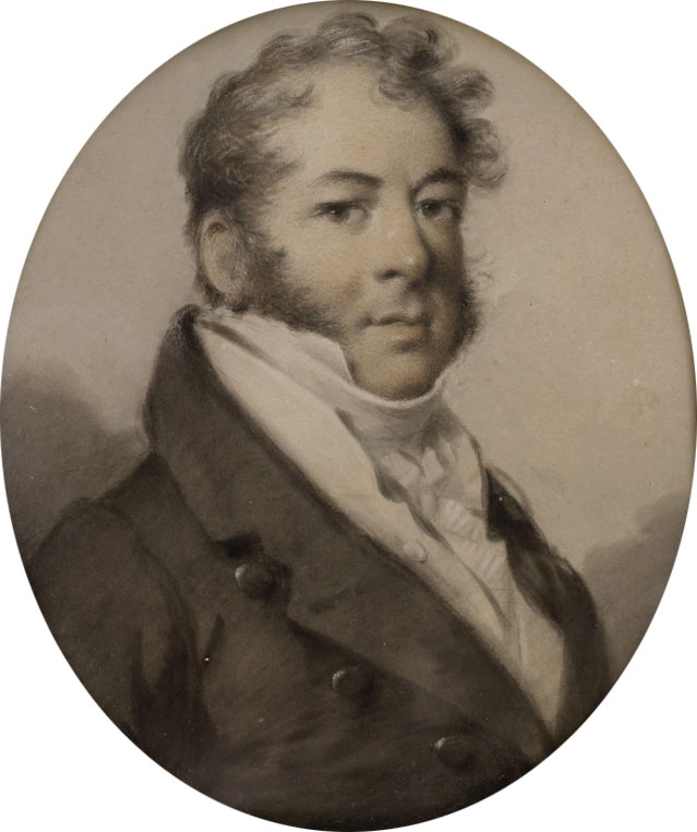 Беларуская (тарашкевіца): Партрэт Міхала Клеафаса Агінскага (Michał Kleafas Aginski)